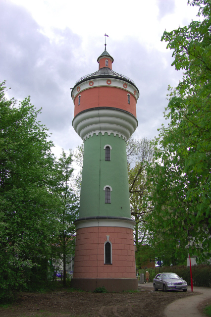 Deisenhofen: Wasserturm, 13 km from M?en, Deutschland (Zone 32).